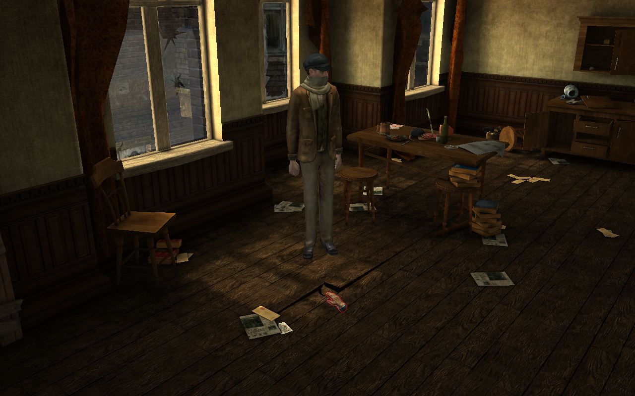 Capture d'écran du jeu Sherlock Holmes contre Jack l'Éventreur dans sa version bêta. Capture réalisée dans la planque de "Bluto", à Whitechapel. Le curseur pointant sur une latte du plancher décollée est une main, c'est-à-dire qu'une interaction est possible. Cet élément a été modifié pour la version finale du jeu.